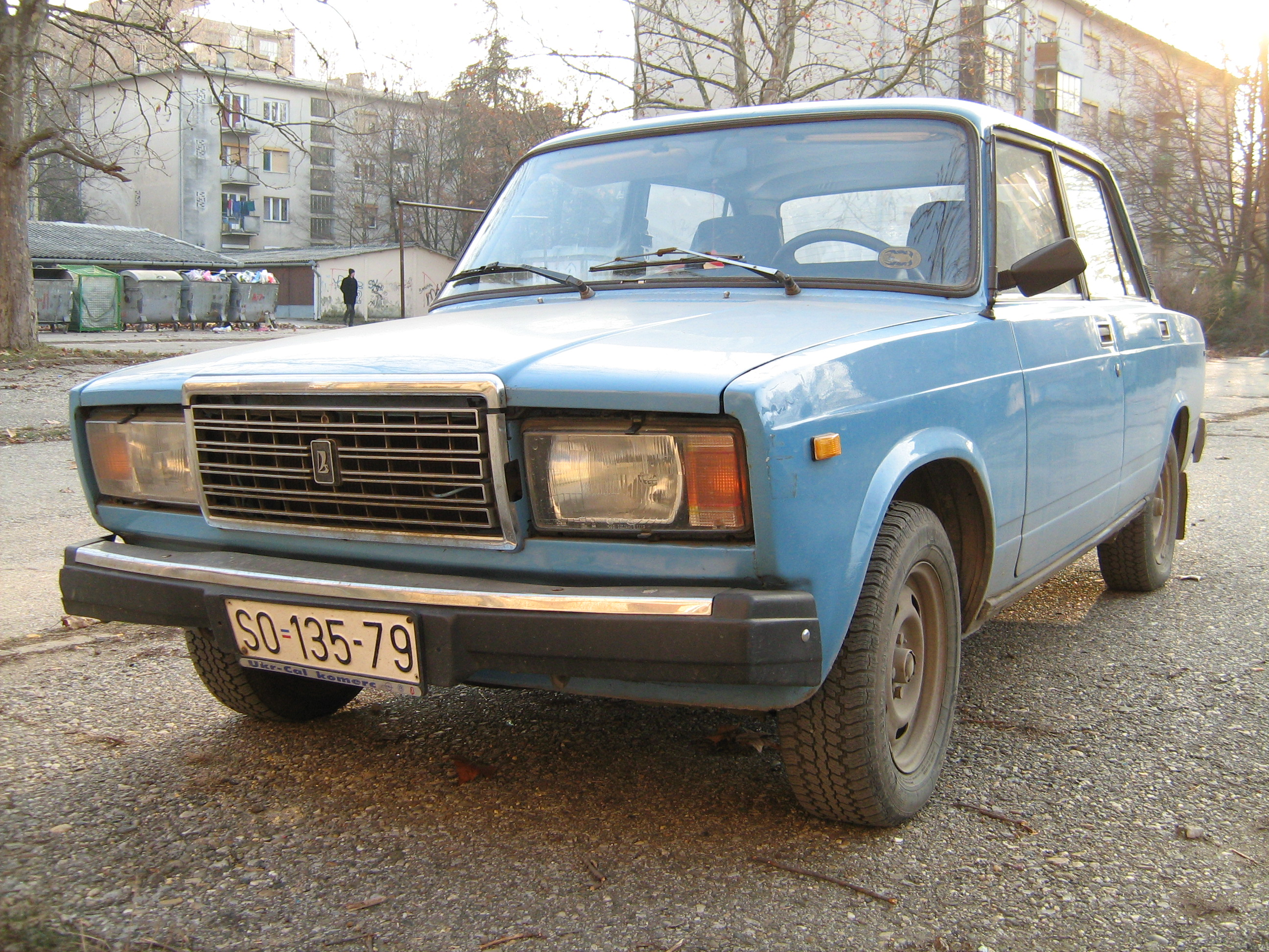 VAZ-2107